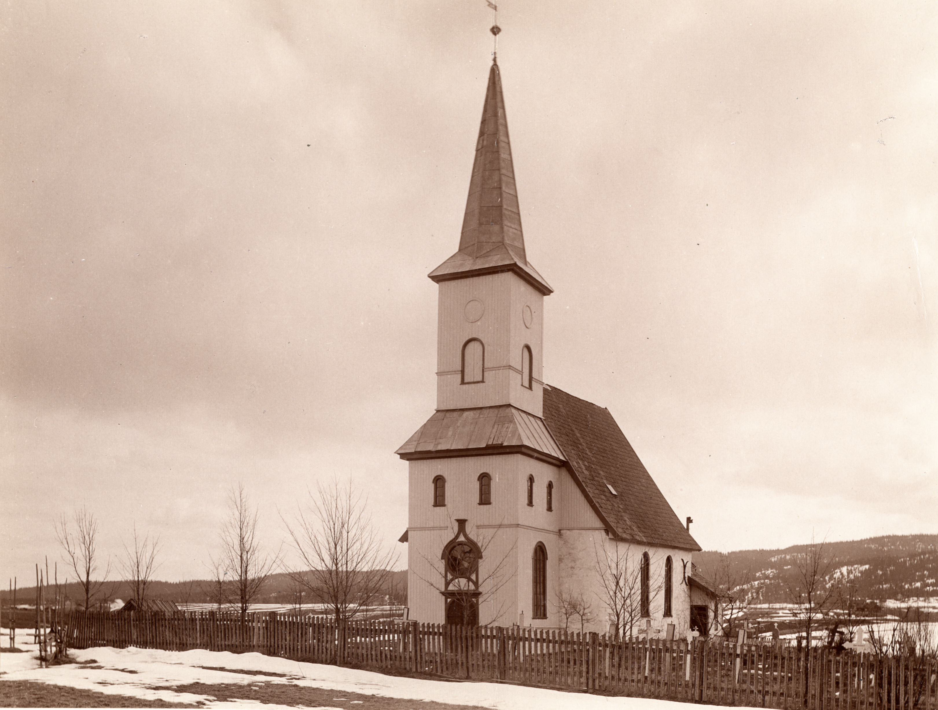 Lørenskog kirke i Lørenskog, Akershus